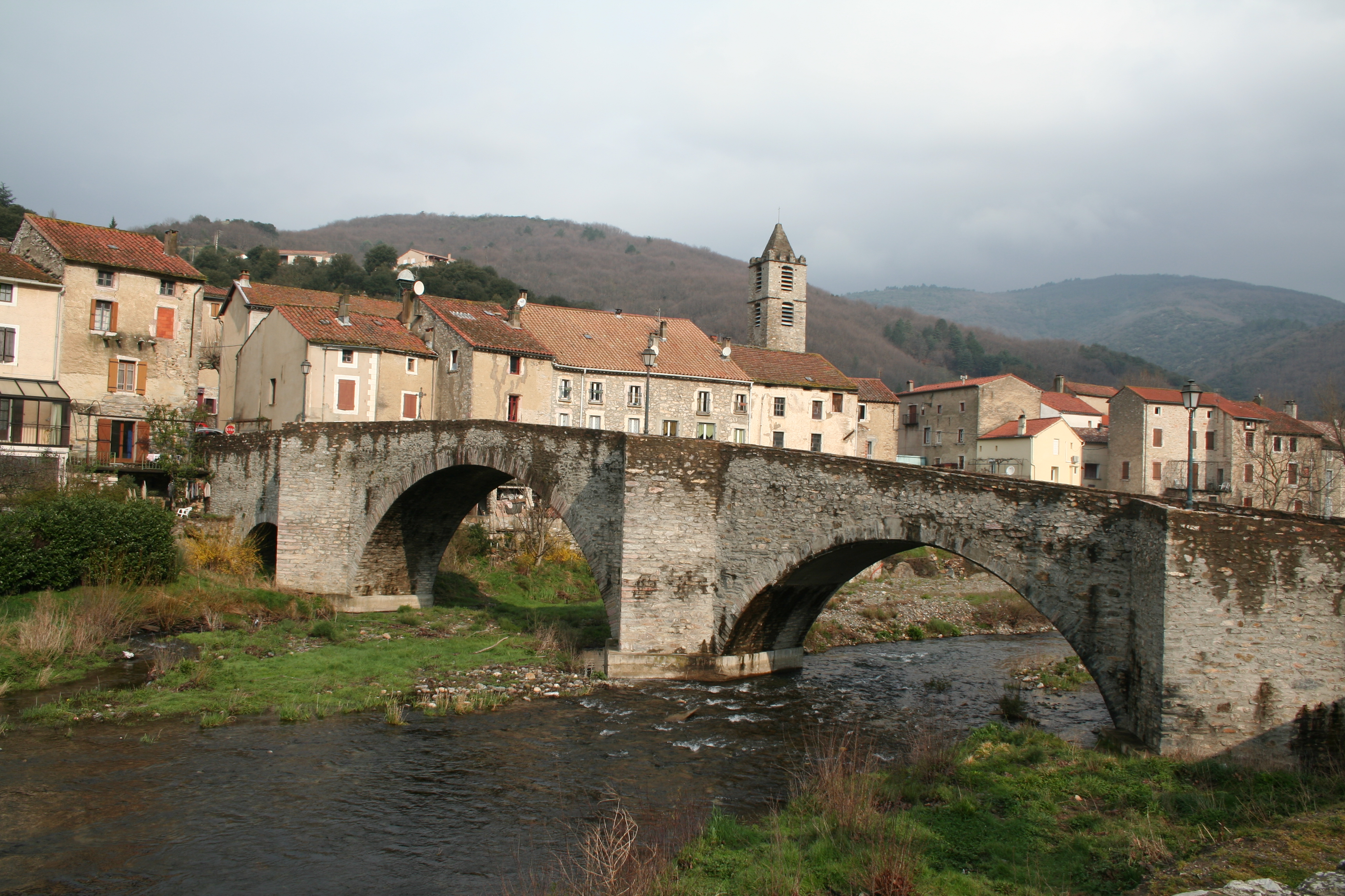 Riols (Hérault) - Pont vieux sur le Jaur.